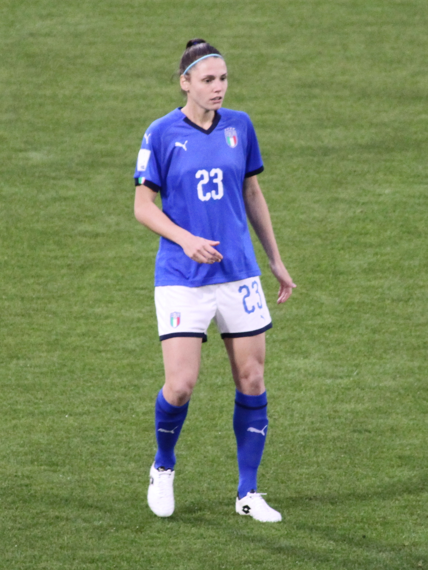 Cecilia Salvai, difensore della nazionale italiana, durante l'incontro Italia-Belgio del 10 aprile 2018 allo stadio Paolo Mazza di Ferrara.